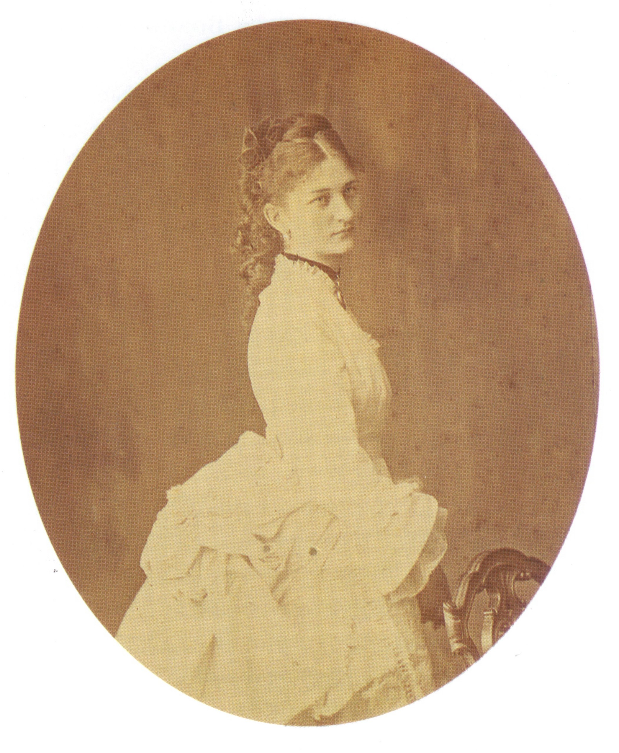 Софья Николаевна Голицына (1851-1825), ур. Делянова, жена В.М.Голицына (1847-1932).